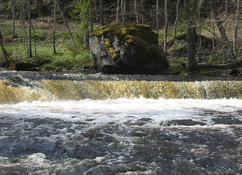 Nõmmeveski juga